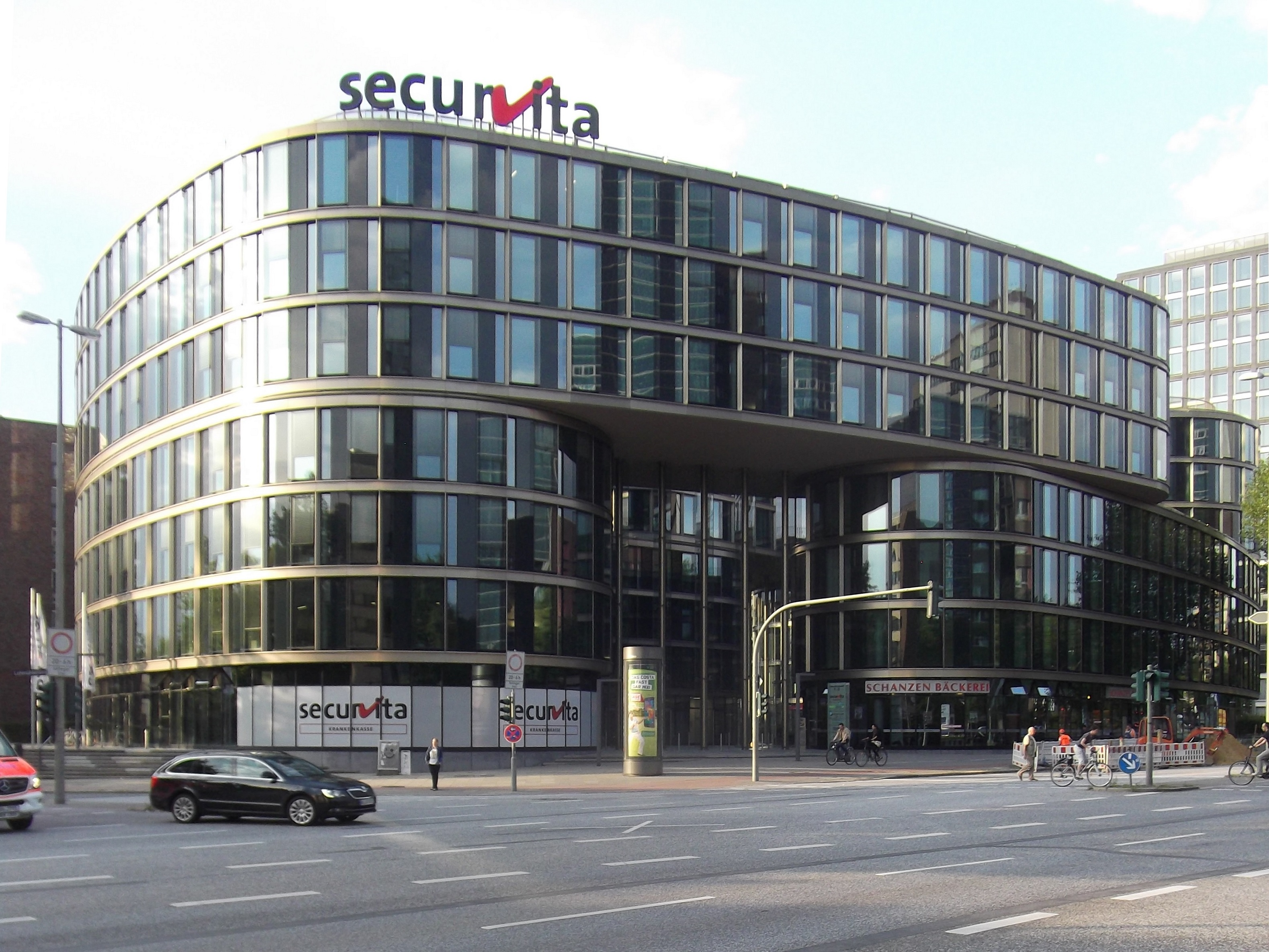 Hamburg, August 2015